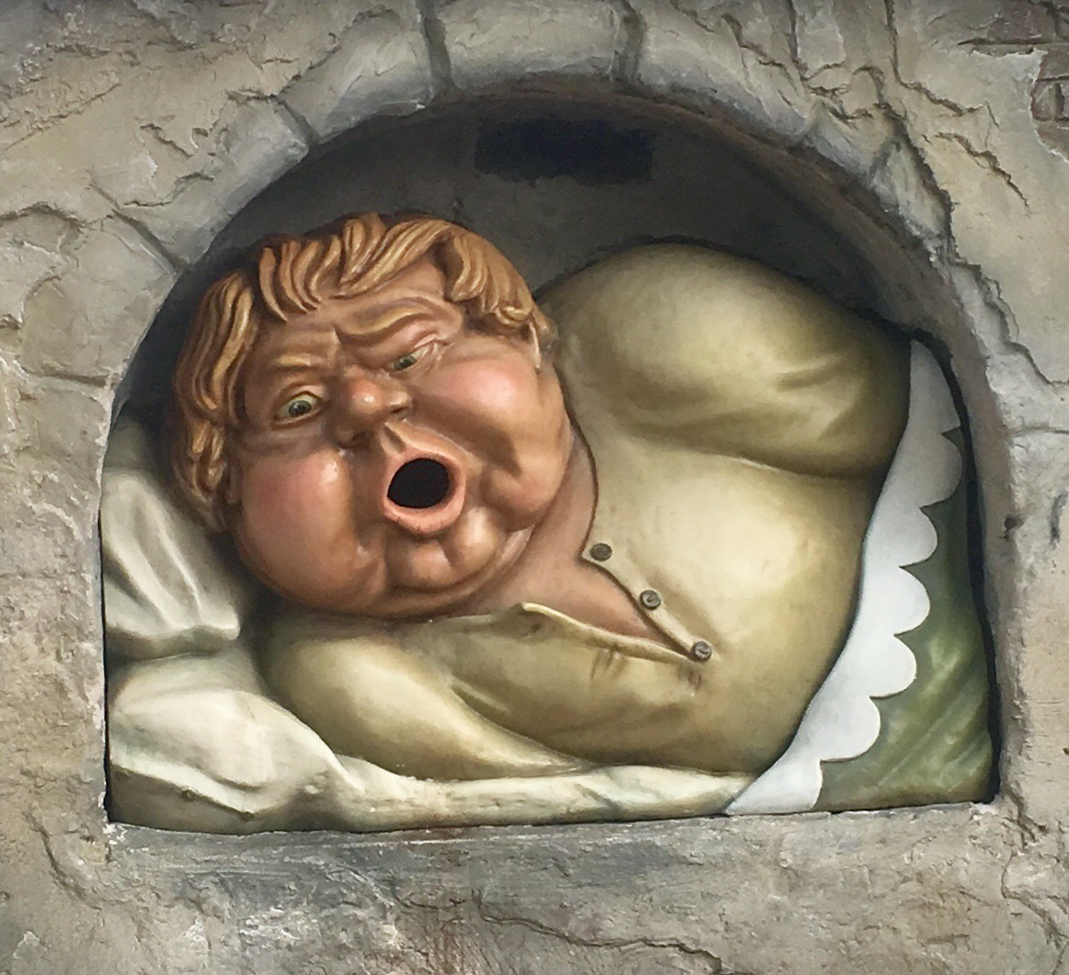 Efteling, Holle Bolle pleun